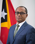 Dionísio da Costa Babo Soares